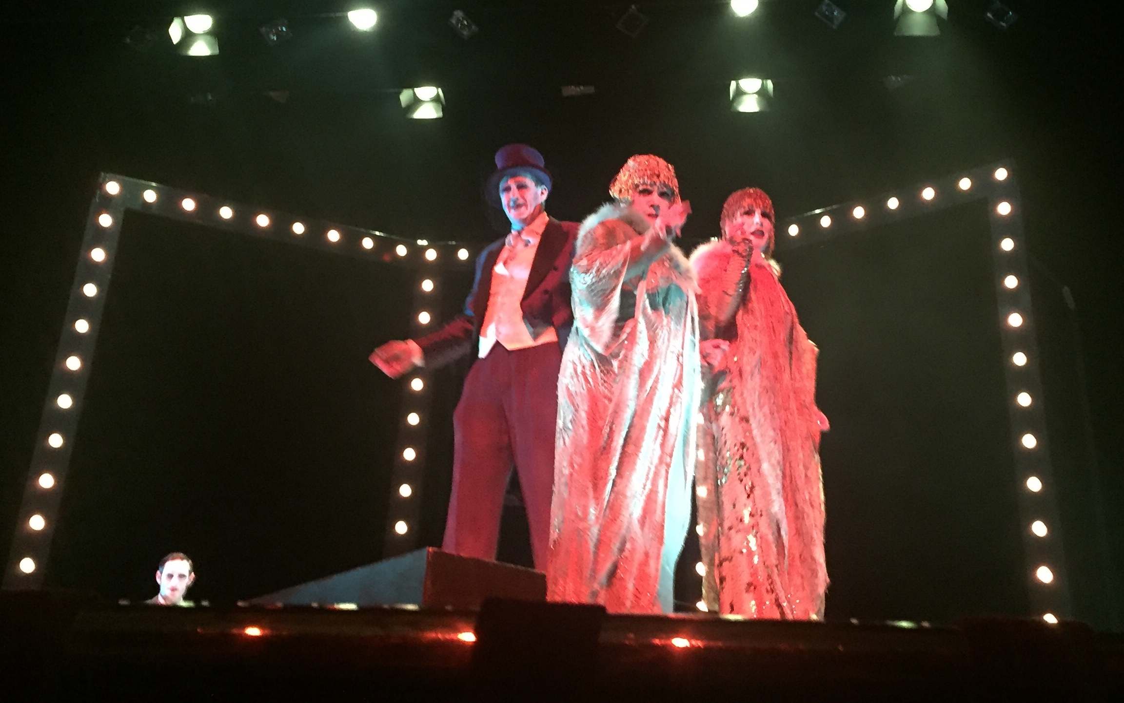 Simplicissimus antzezlana